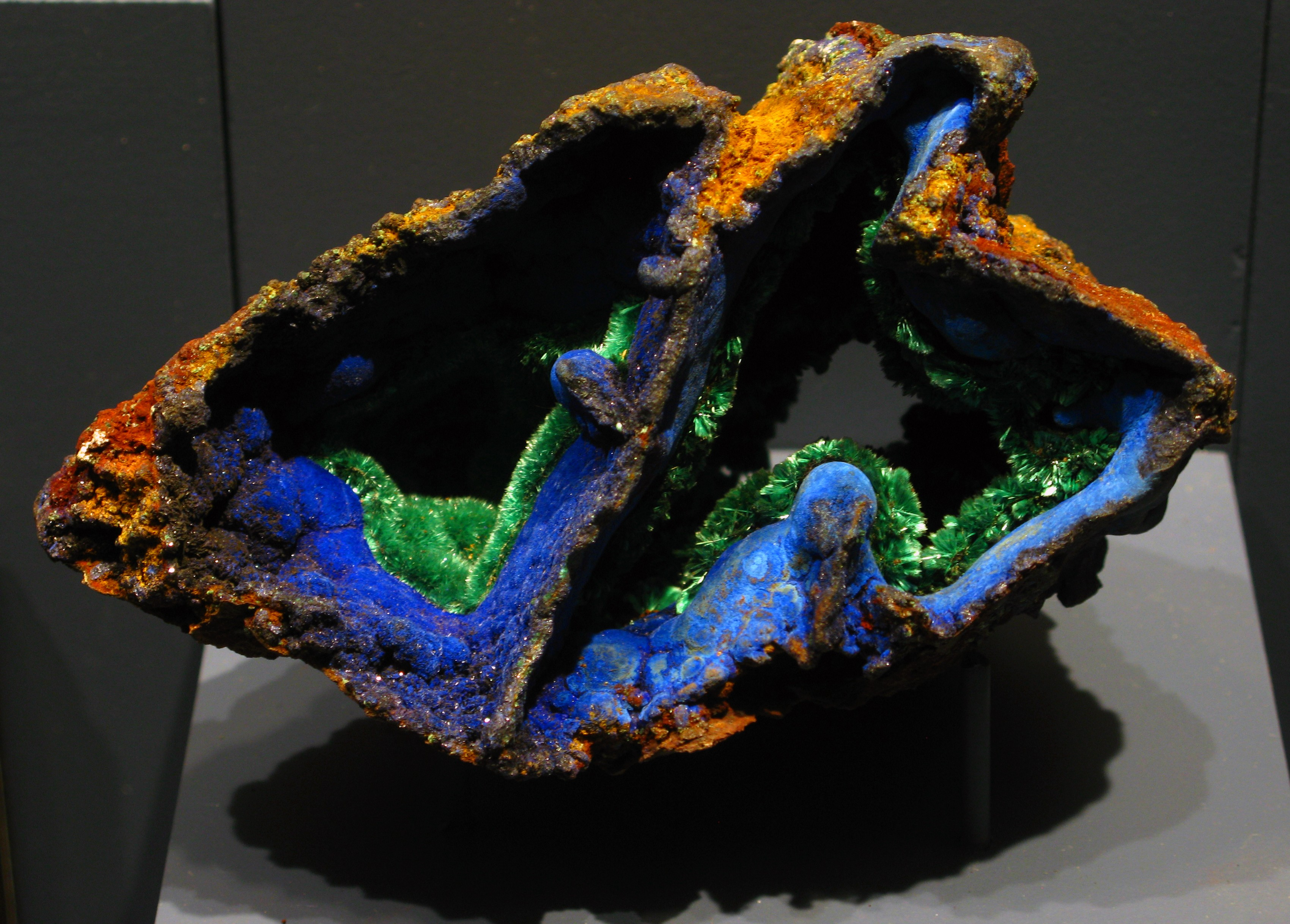 Azurite + Malachite, Copper Queen mine, Bisbee AZ